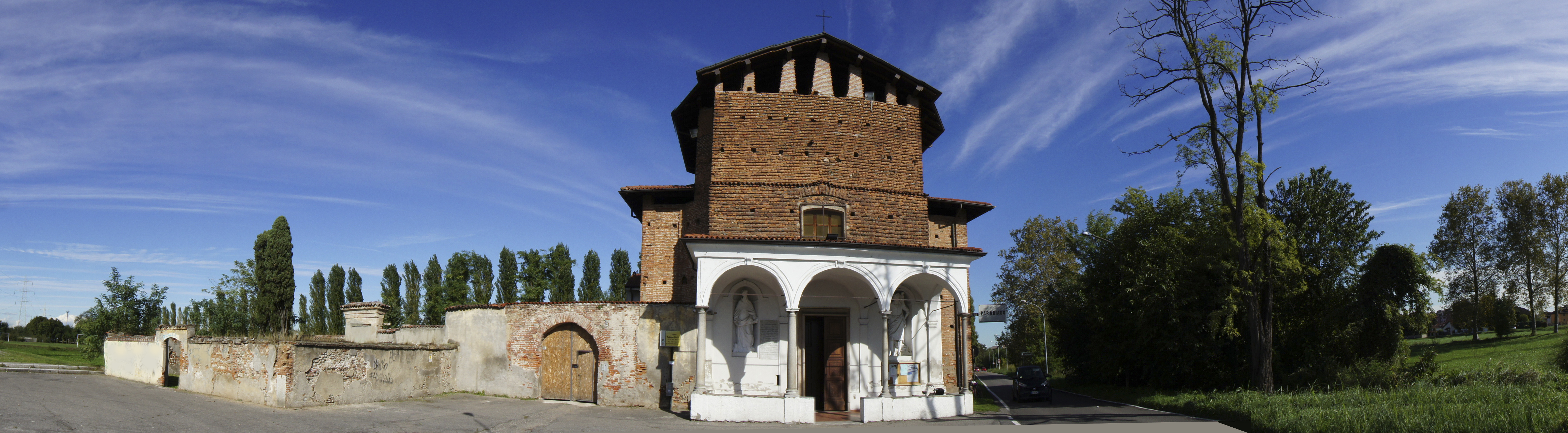 Santuario della Madonna di Dio il Sà This is a photo of a monument which is part of cultural heritage of Italy.